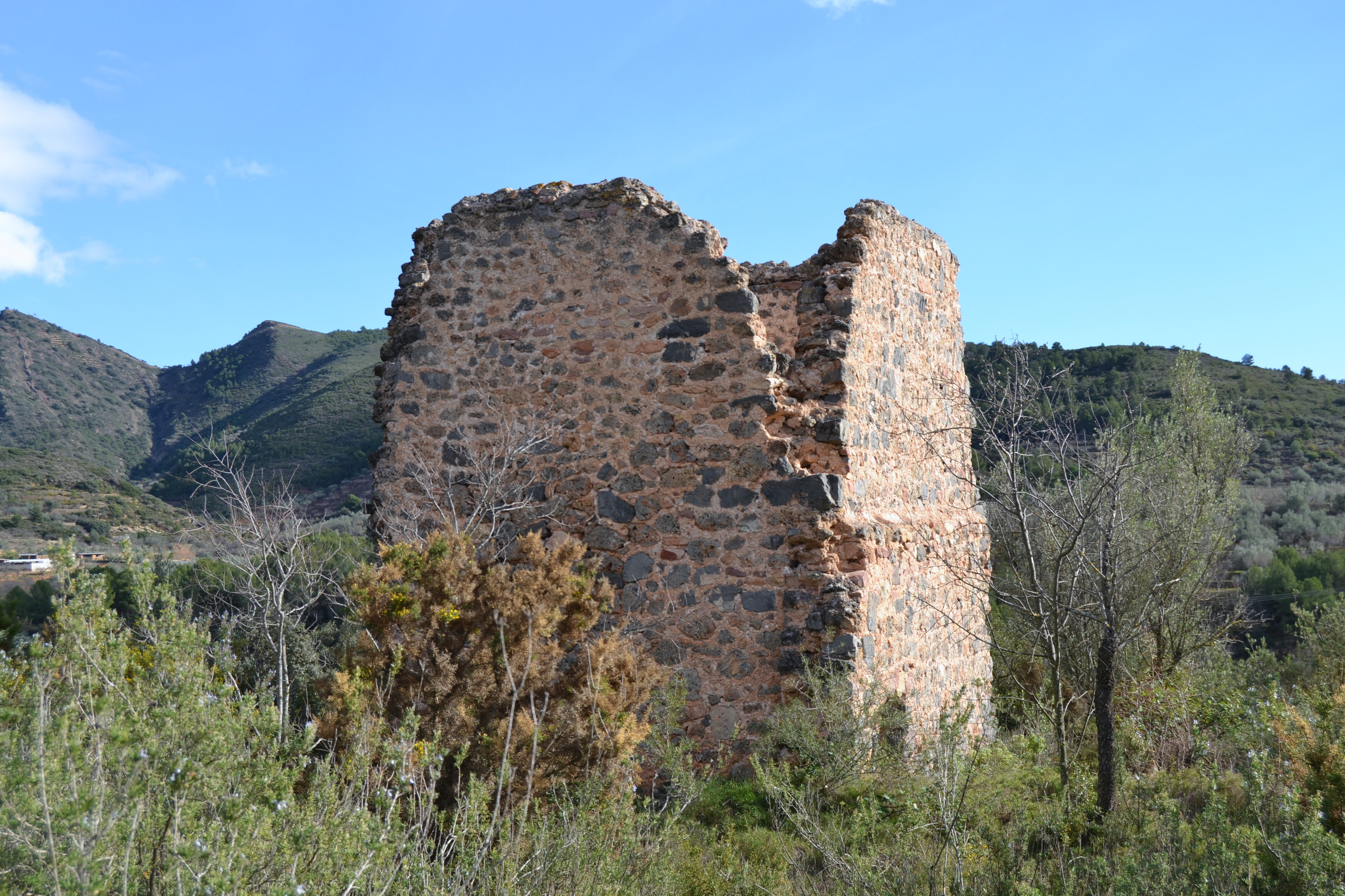 Torreta de Xóvar.